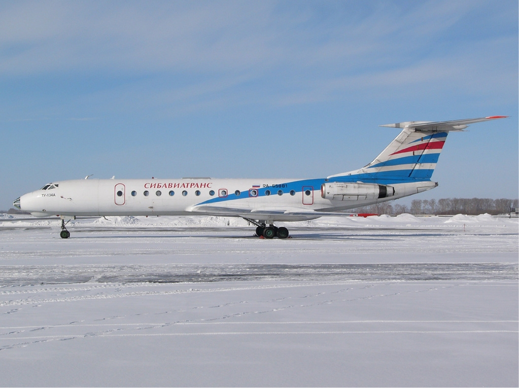 Sibaviatrans Tupolev Tu-134